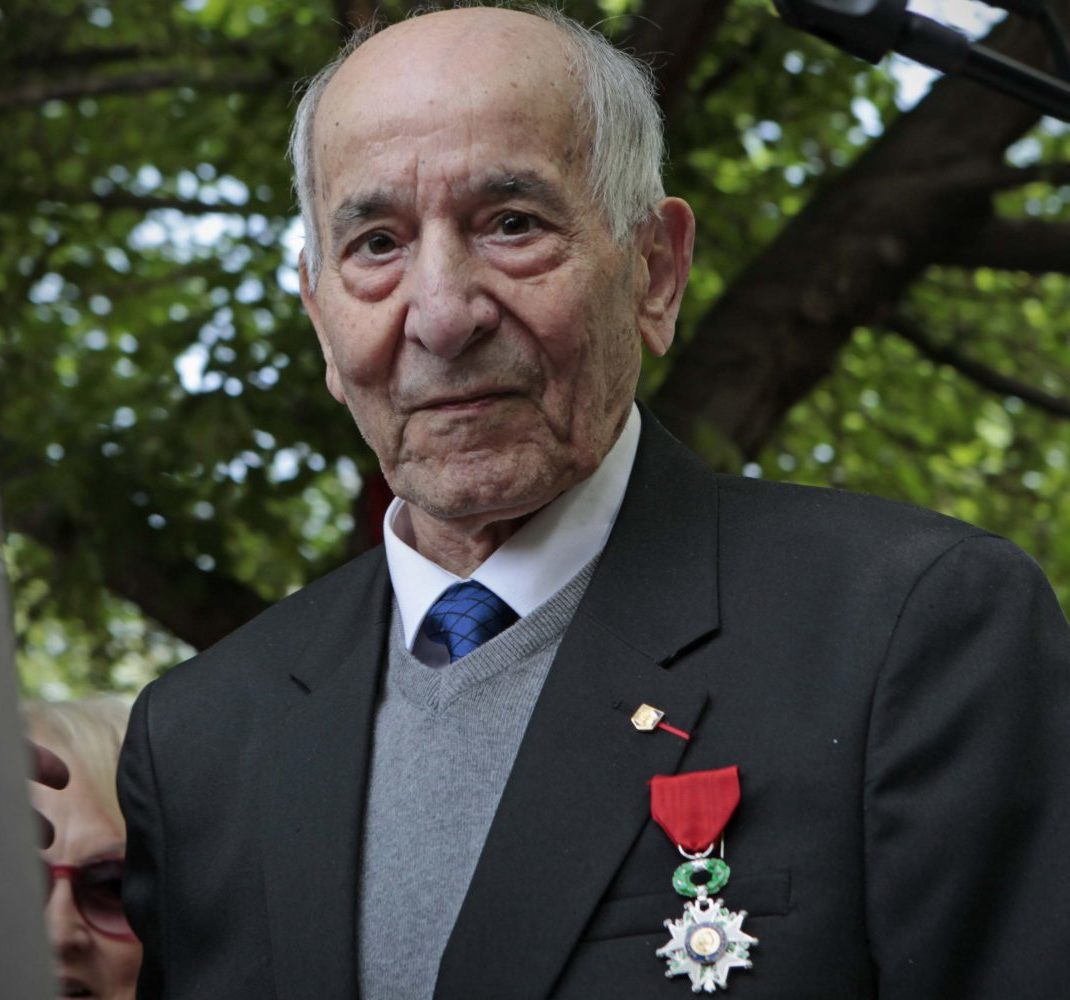 El Ayuntamiento de Madrid rinde homenaje a los combatientes de ‘La Nueve’ con un jardín que llevará su nombre La alcaldesa de Madrid, Manuela Carmena, y la de París, Anne Hidalgo, asistieron a la inauguración donde se descubrió una placa conmemorativa. En el acto participó el único miembro vivo de “La Nueve”, Rafael Gómez, además de diversos familiares de los integrantes del escuadrón. Manuela Carmena ha insistido en la necesidad de honrar la memoria histórica y ha señalado que “la libertad, la igualdad y la fraternidad son valores necesarios para el futuro de la humanidad”.